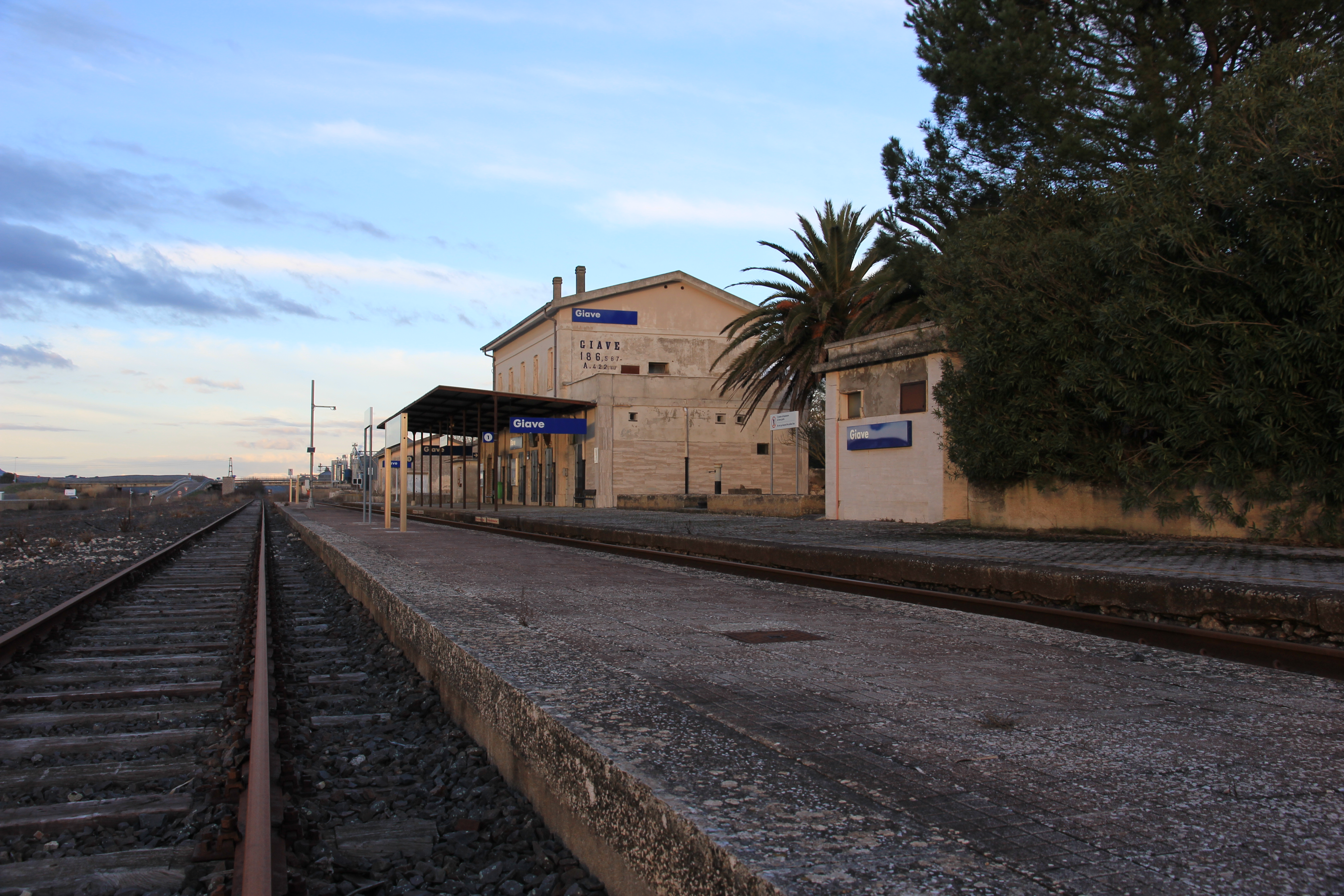 Giave - Stazione ferroviaria